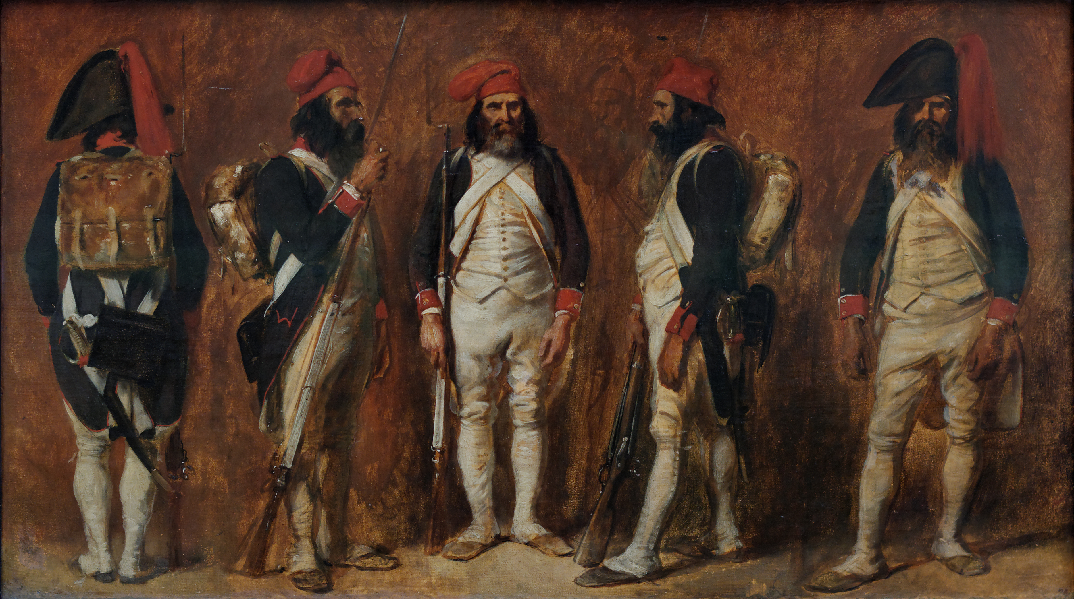 Soldats de la Première République. Denis-Auguste-Marie RAFFET (1804-1860), vers 1840. Exposé à la Neue Pinakothek de Munich.